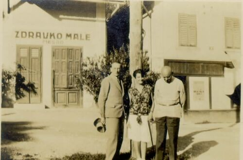 Oton Župančič, Niča in Izidor Cankar na Bledu